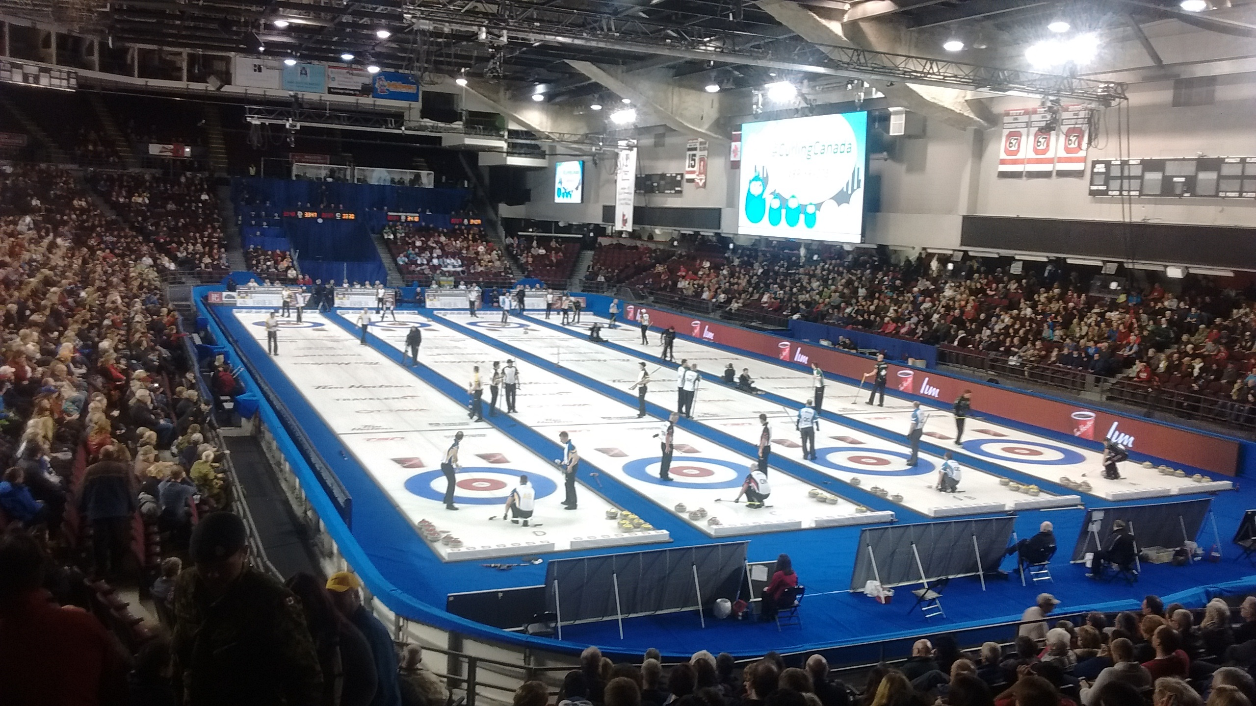 2016 Tim Hortons Brier Draw 7